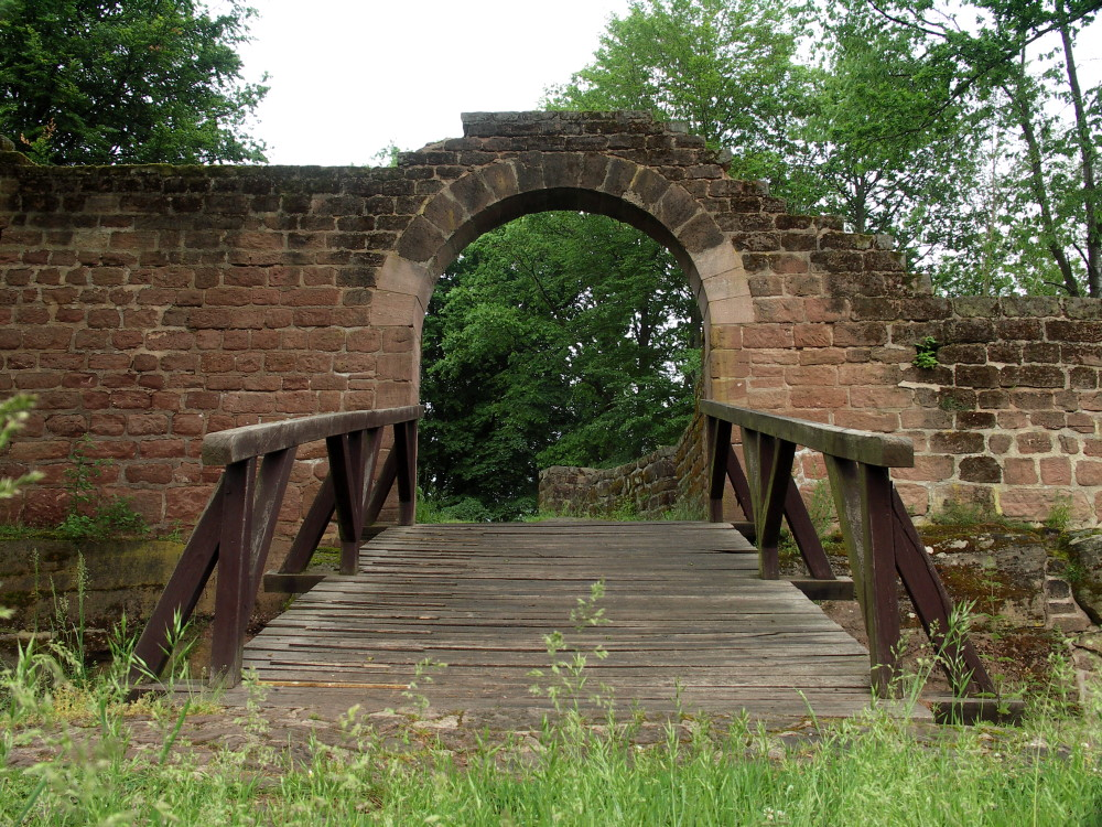 Steinenschloss, Eingangsportal